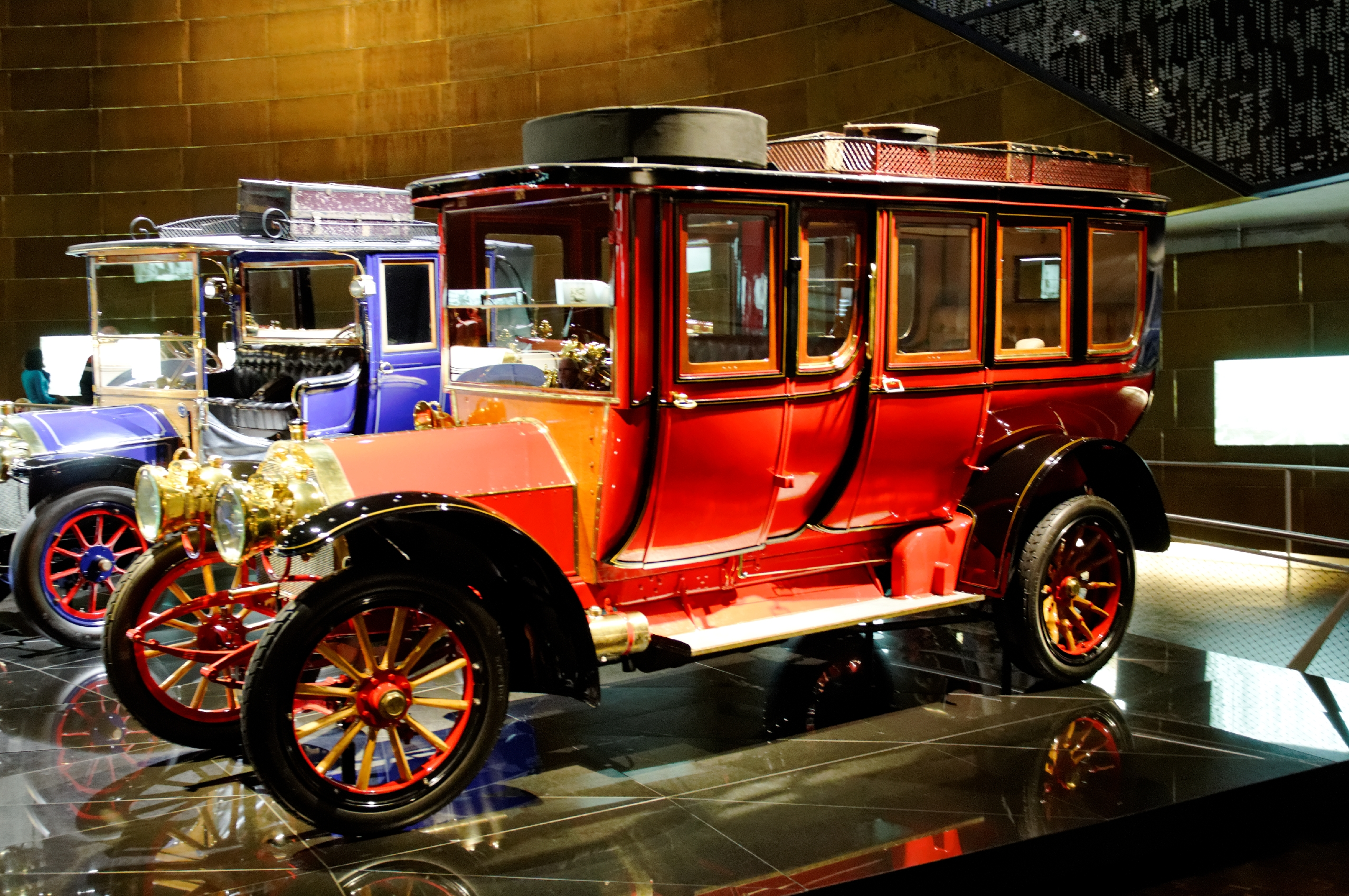 Bilder aus dem Mercedes-Benz-Museum 2015